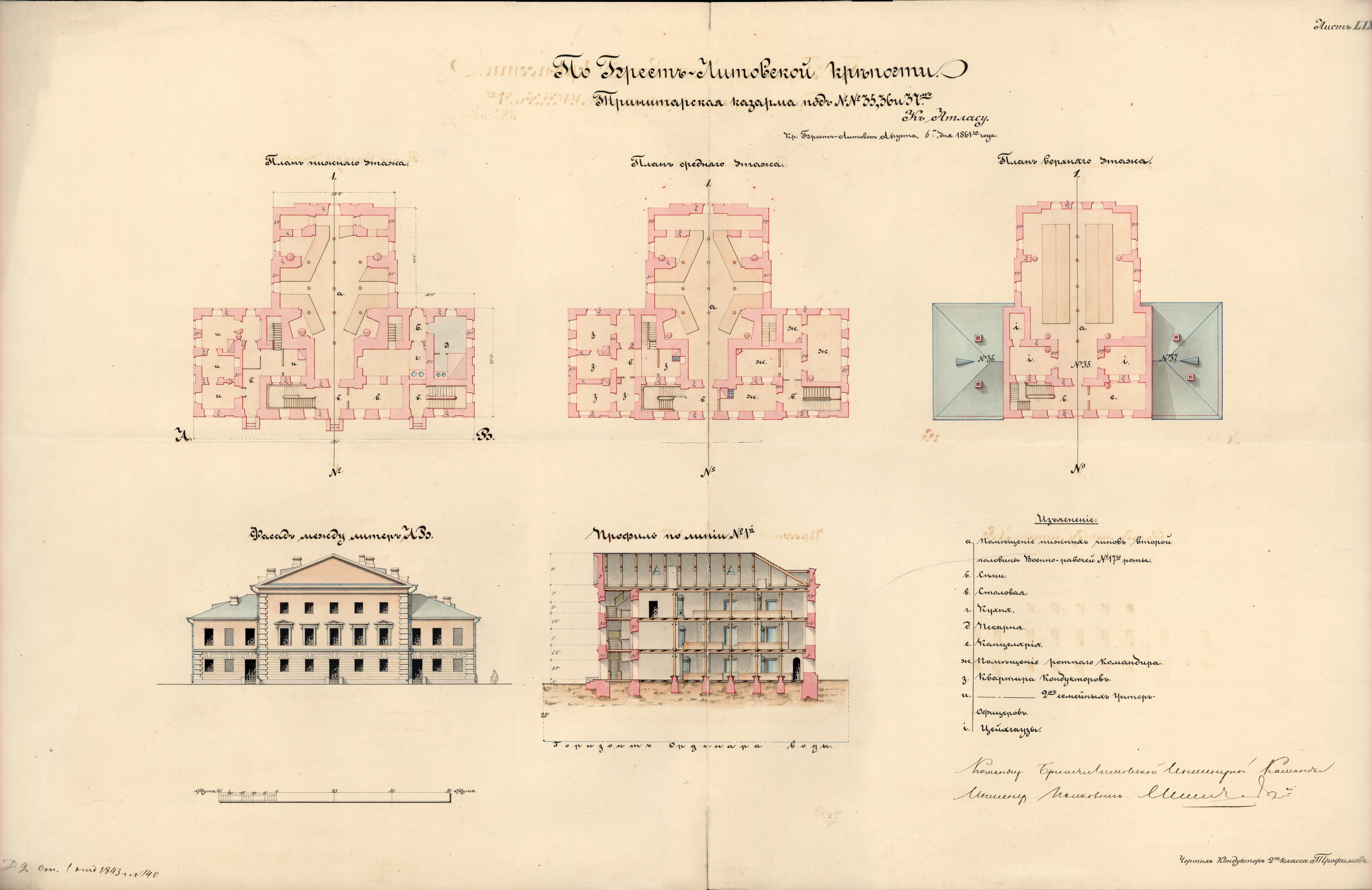 Беларуская (тарашкевіца): Берасьце (Bieraście), Кобрынскае прадмесьце (Kobrynskaje pradmieściе). Касьцёл Сьвятой Барбары і кляштар трынітарыяў па перабудове пад расейскія кашары